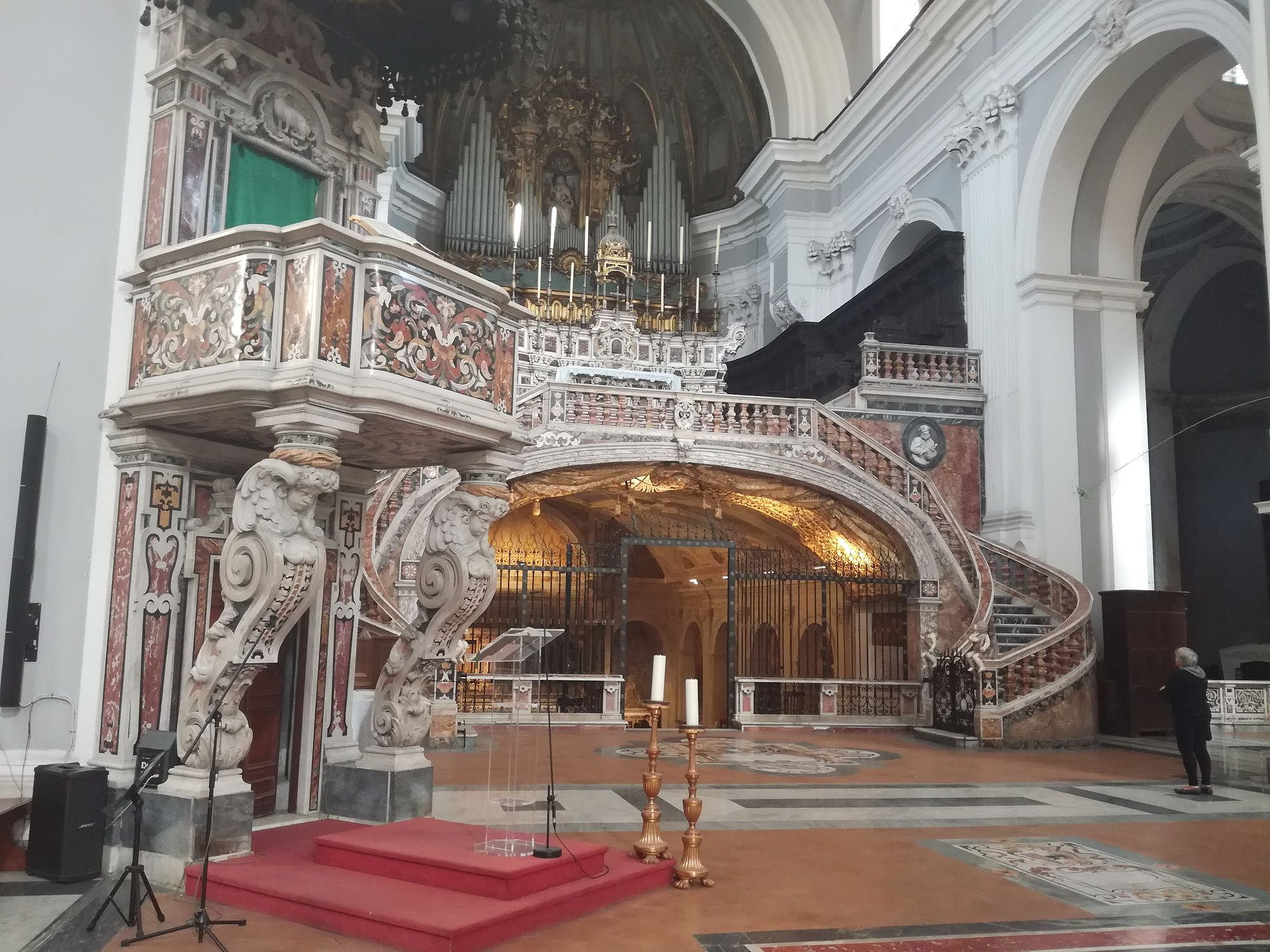 Interno Sanità